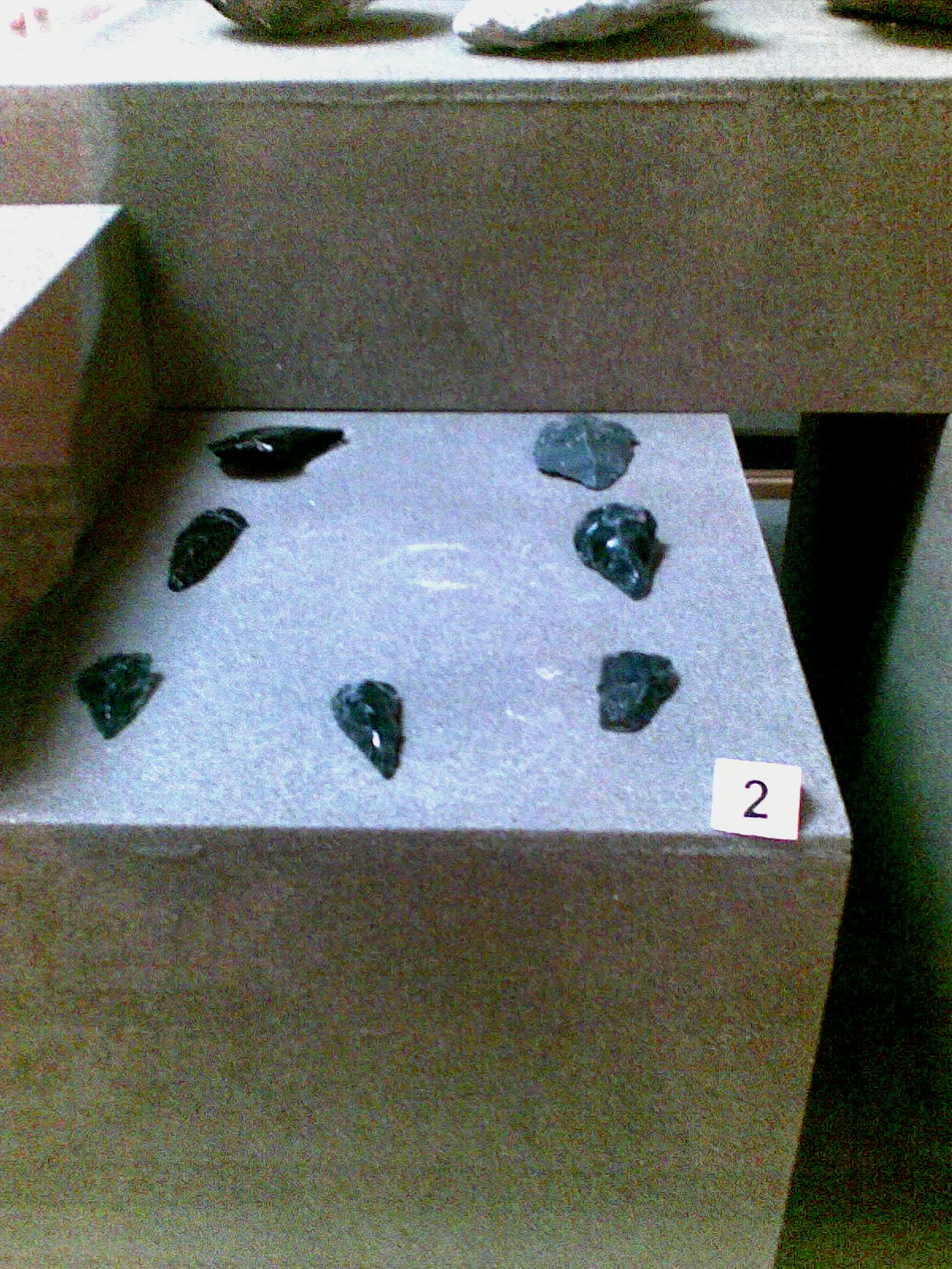 Qazma mağarasından əldə edilmiş nukleuslar